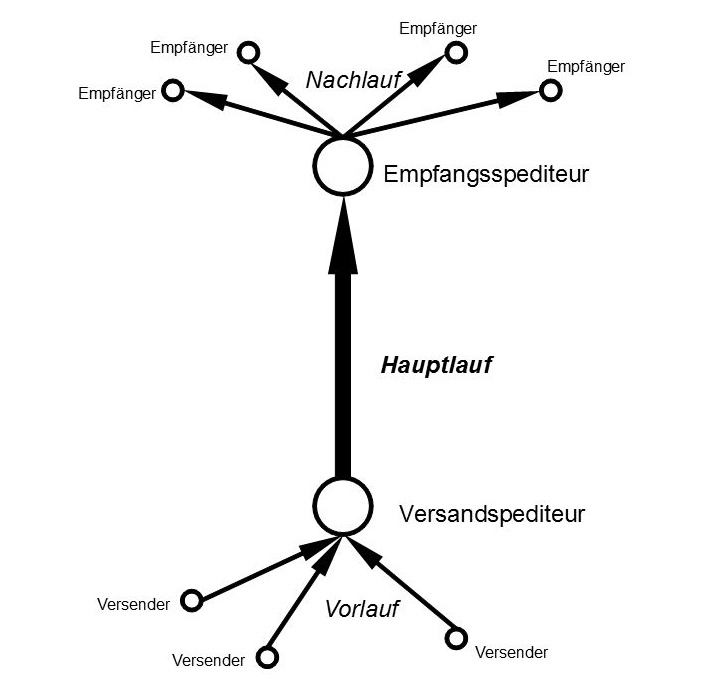 Hauptlauf - graphische Darstellung